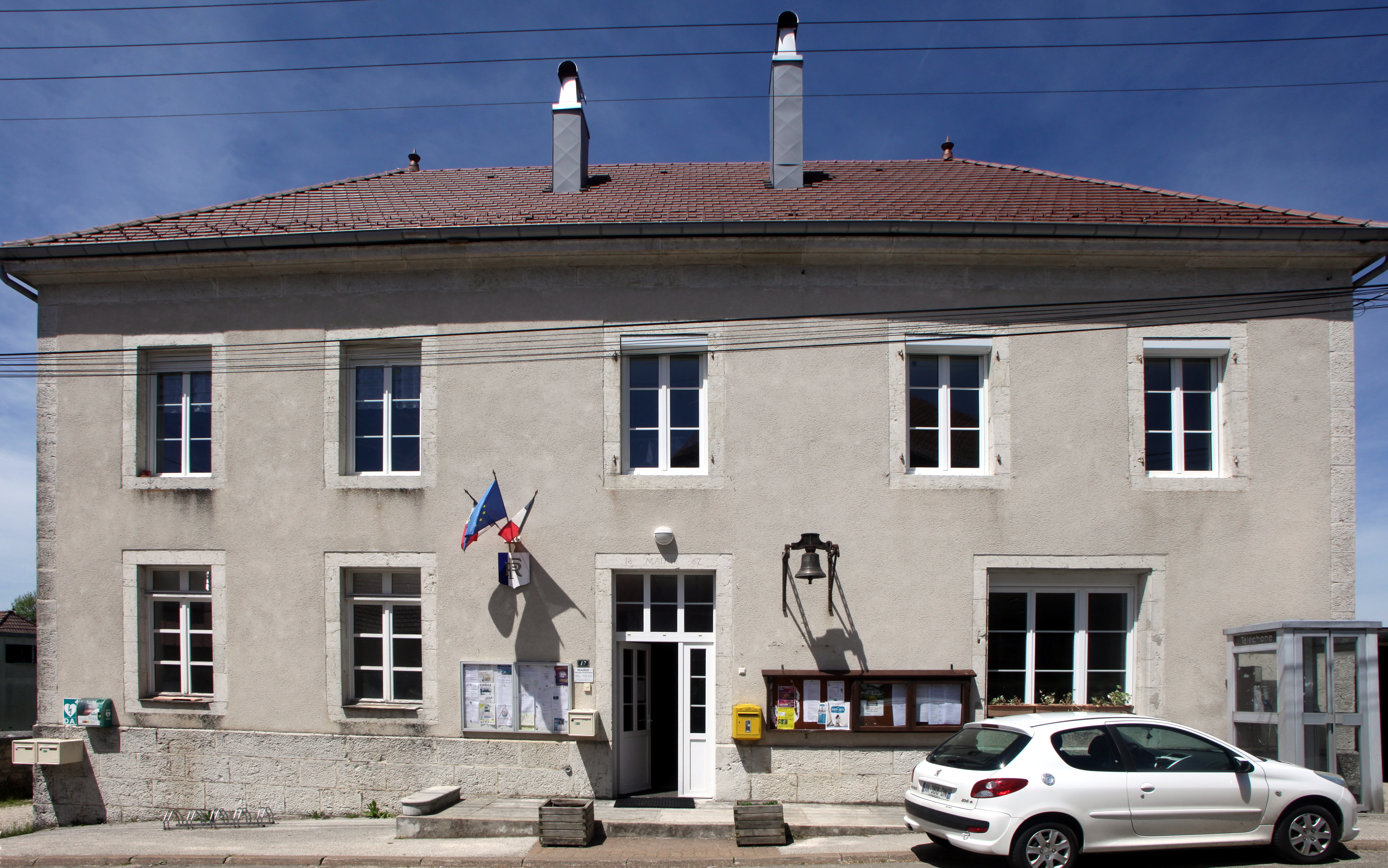 Mairie de Bief-du-Fourg (Jura).